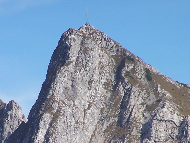 Giewont jesienią (zdjęcie z 10-krotnym zoomem optycznym). Widok z Hali Upłaz (czerwony szlak turystyczny z Doliny Kościeliskiej na Czerwone Wierchy). Data: 2006-05-09 Autor:Jerzy Opioła